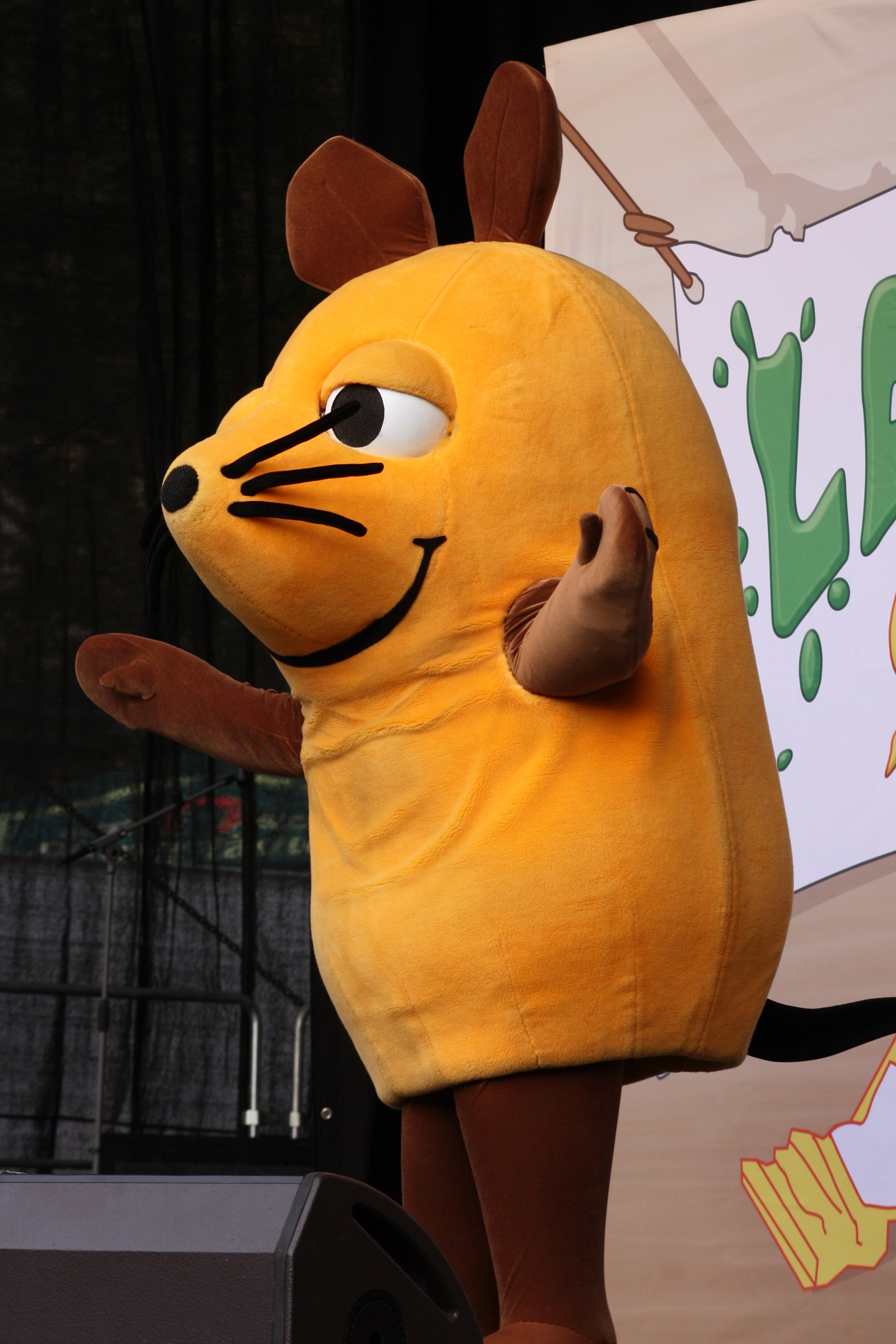 Wiesbadener Stadtfest 2013: Die Maus live